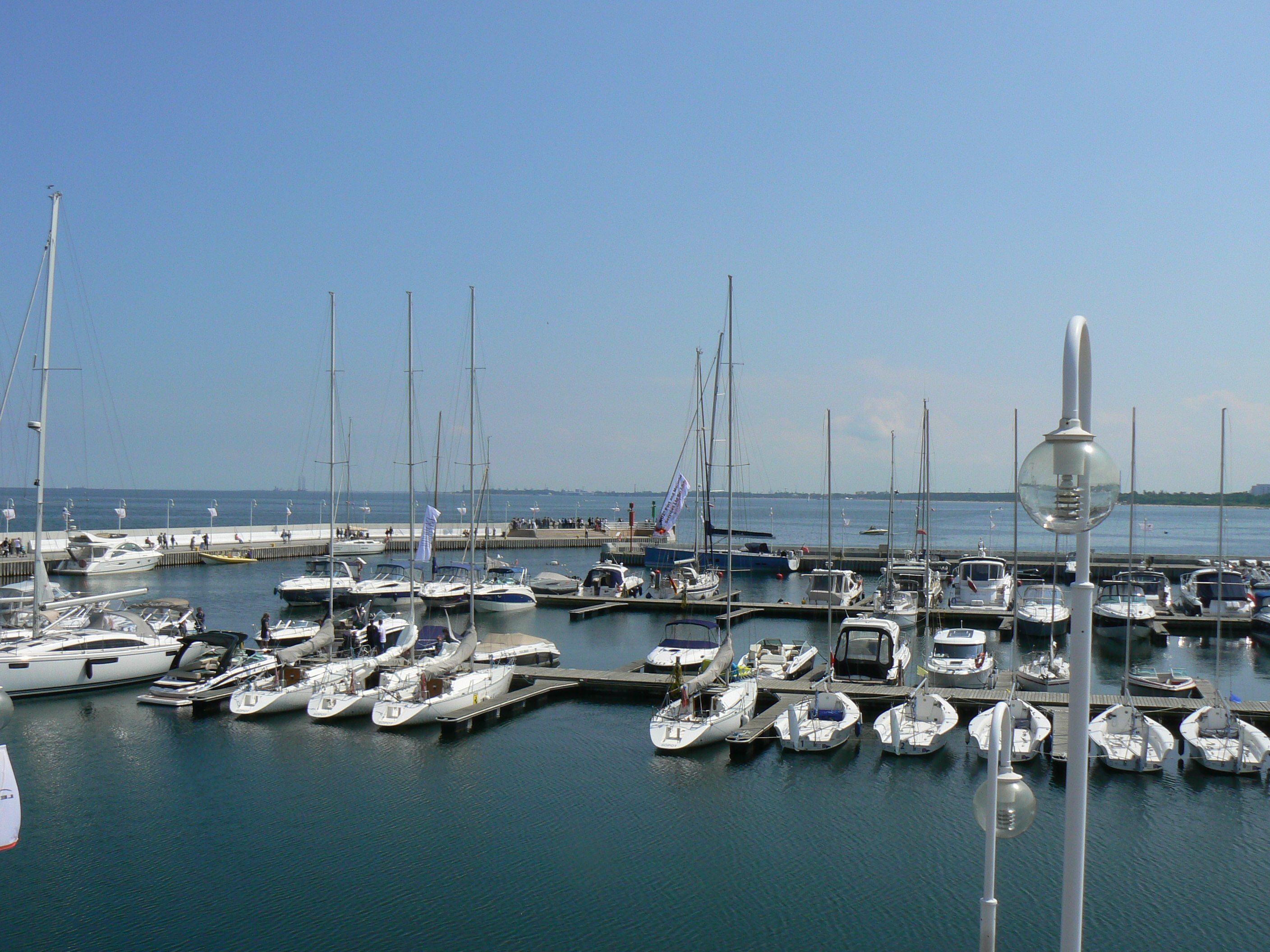 Sopot Dolny - marina przy molo